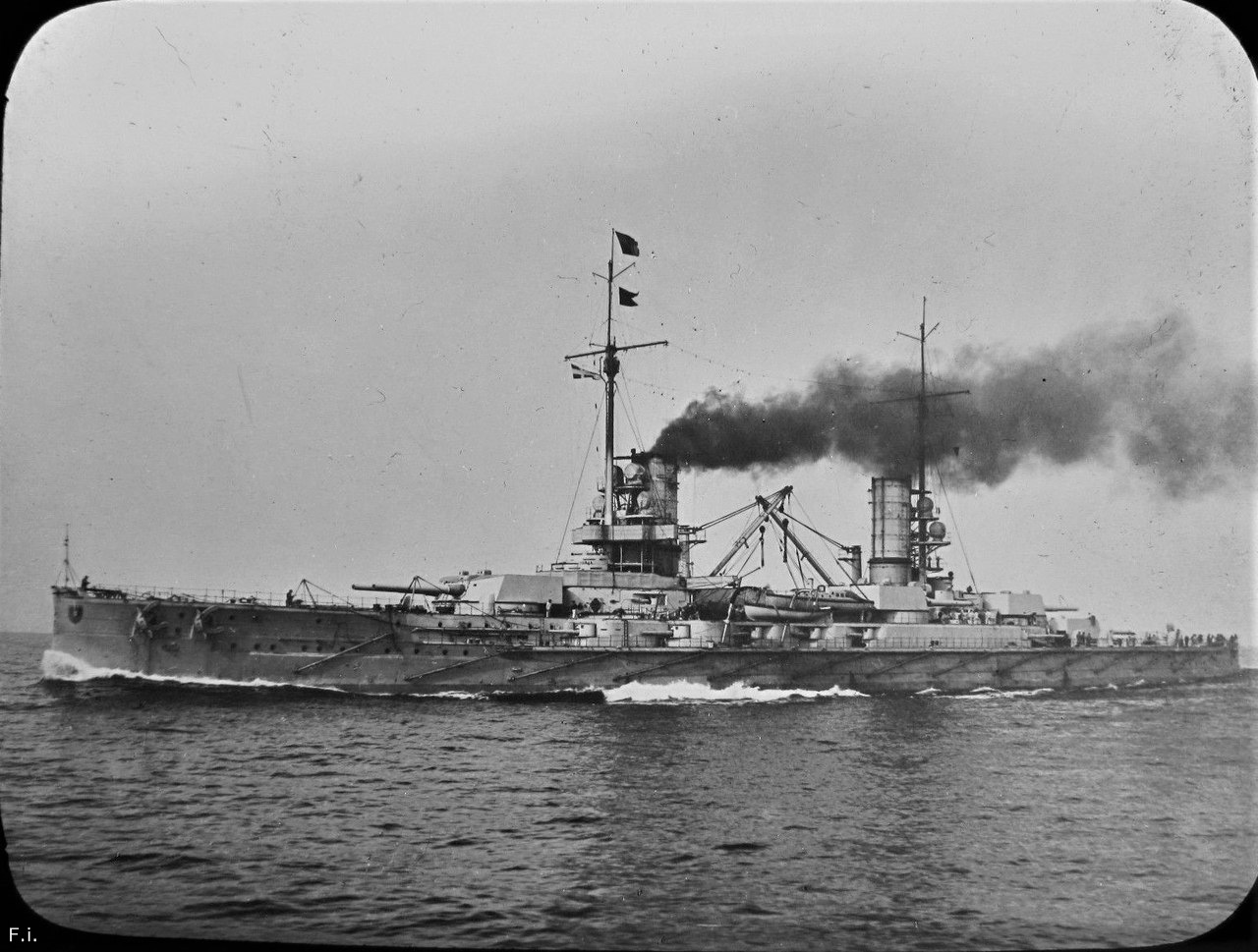 Linienschiff "SMS Kaiser" Großlinienschiff (Schlachtschiff) "S.M.S. Kaiser" in See. Ansicht der Backbordseite Information added by Wikimedia users.Battleship Kaiser steaming at high speed, sometime between 1912 and 1916.